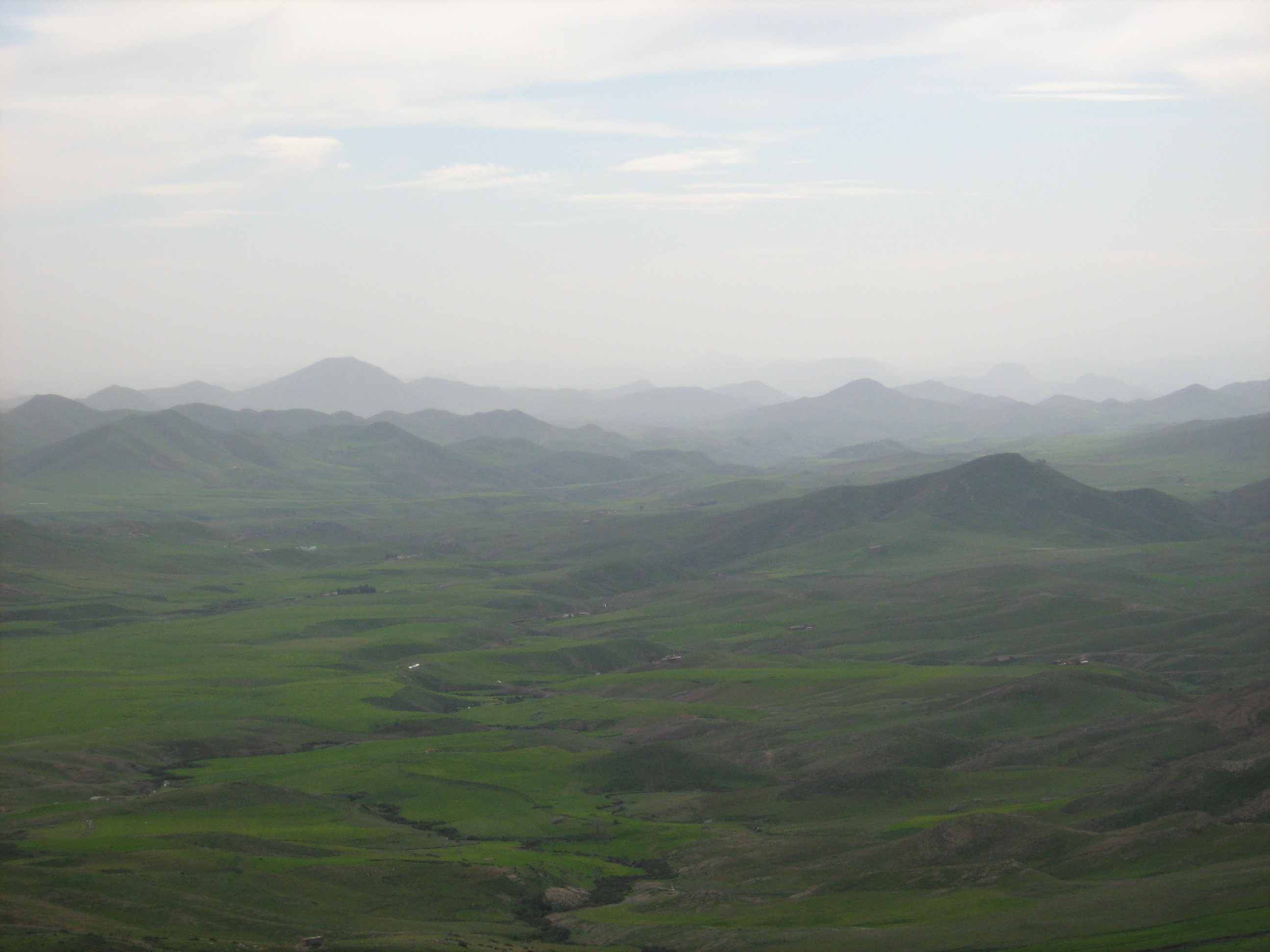 Vue panoramique moyen atlassique : Paysage d'Itto surplombant la ville d'Azrou